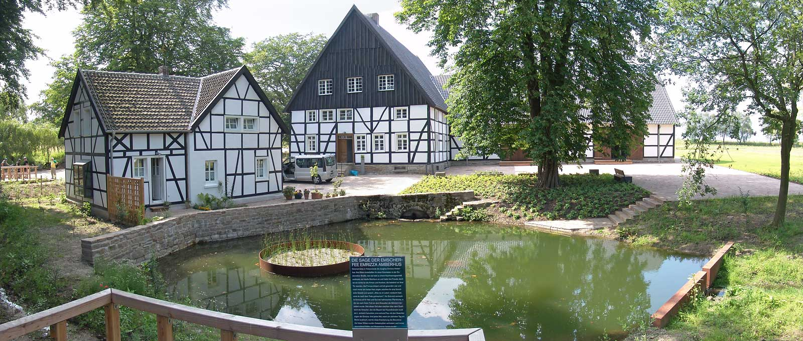 Emscherquellhof mit Quellteich der Emscher in Holzwickede (NRW)